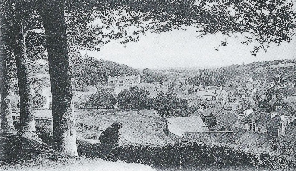 Le bourg de Pont-Aven au début du XXème siècle (photographe inconnu)